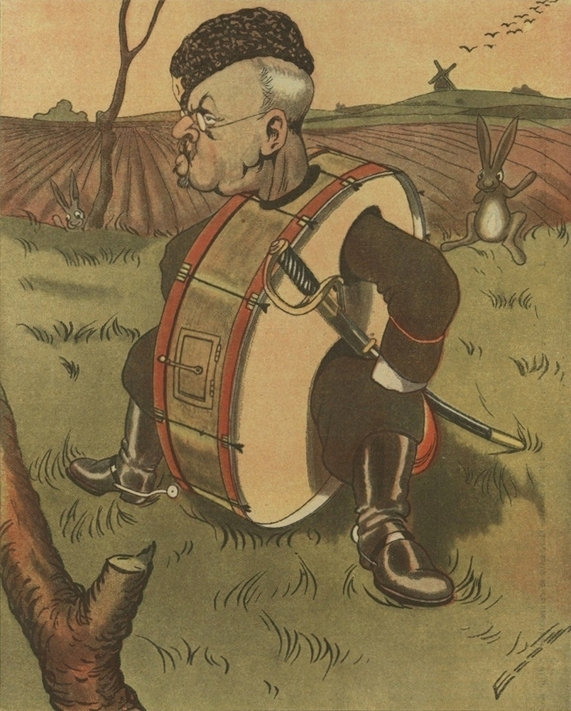 По слухам, военный министр ген. Редигер, усовершенствовав в министерстве письменную часть, приступил к капитальнейшей реформе армии. Ему предстоит решить вопрос, быть в армии барабану, или нет.